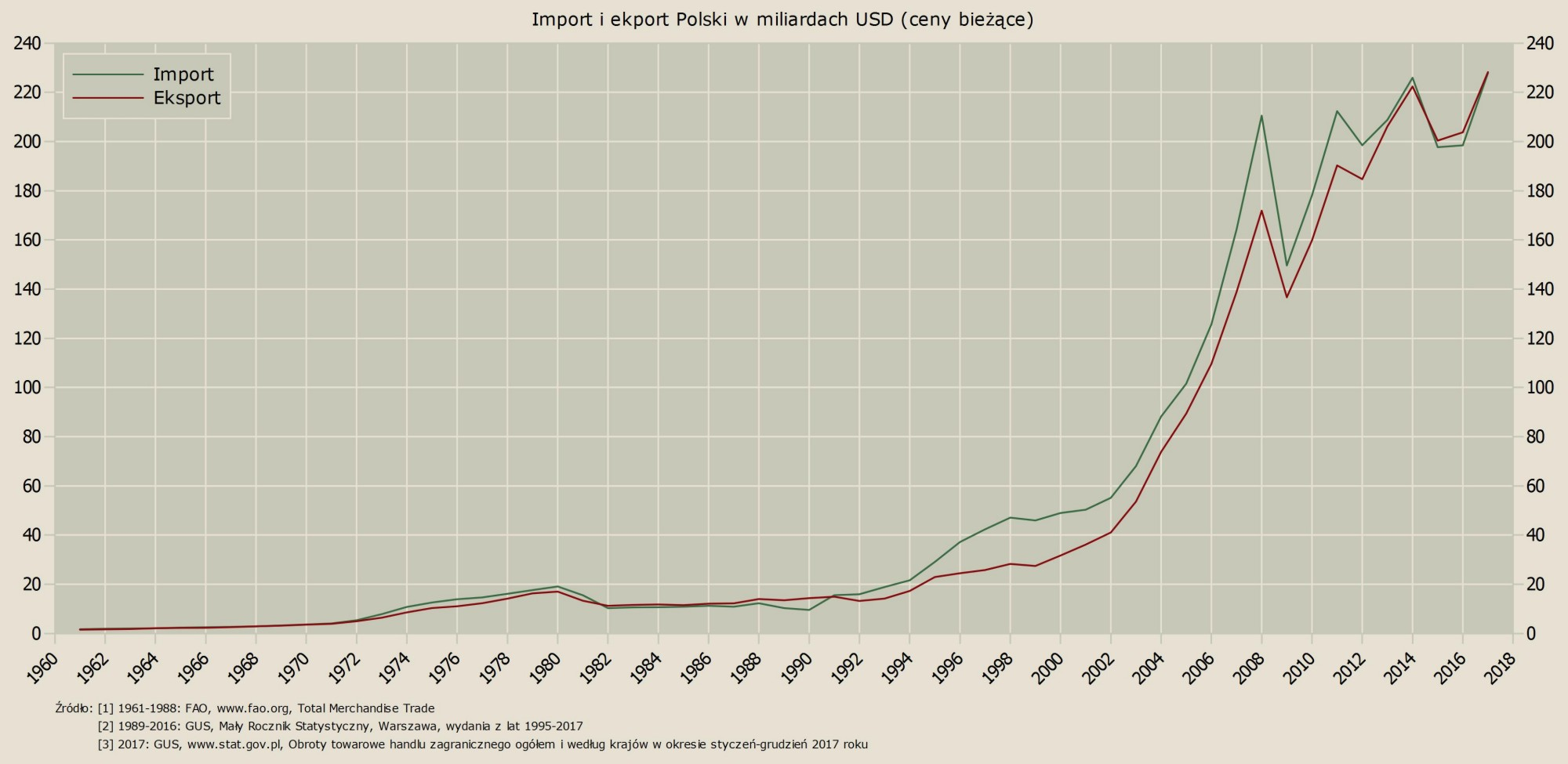 Import i eksport Polski w mld USD (ceny bieżące). Źródło: 1961-1988: Organizacja Narodów Zjednoczonych do spraw Wyżywienia i Rolnictwa (FAO) 1989-2015: GUS, "Mały Rocznik Statystyczny" (różne lata) 2016: GUS, Wskaźniki makroekonomiczne (Roczne wskaźniki makroekonomiczne)